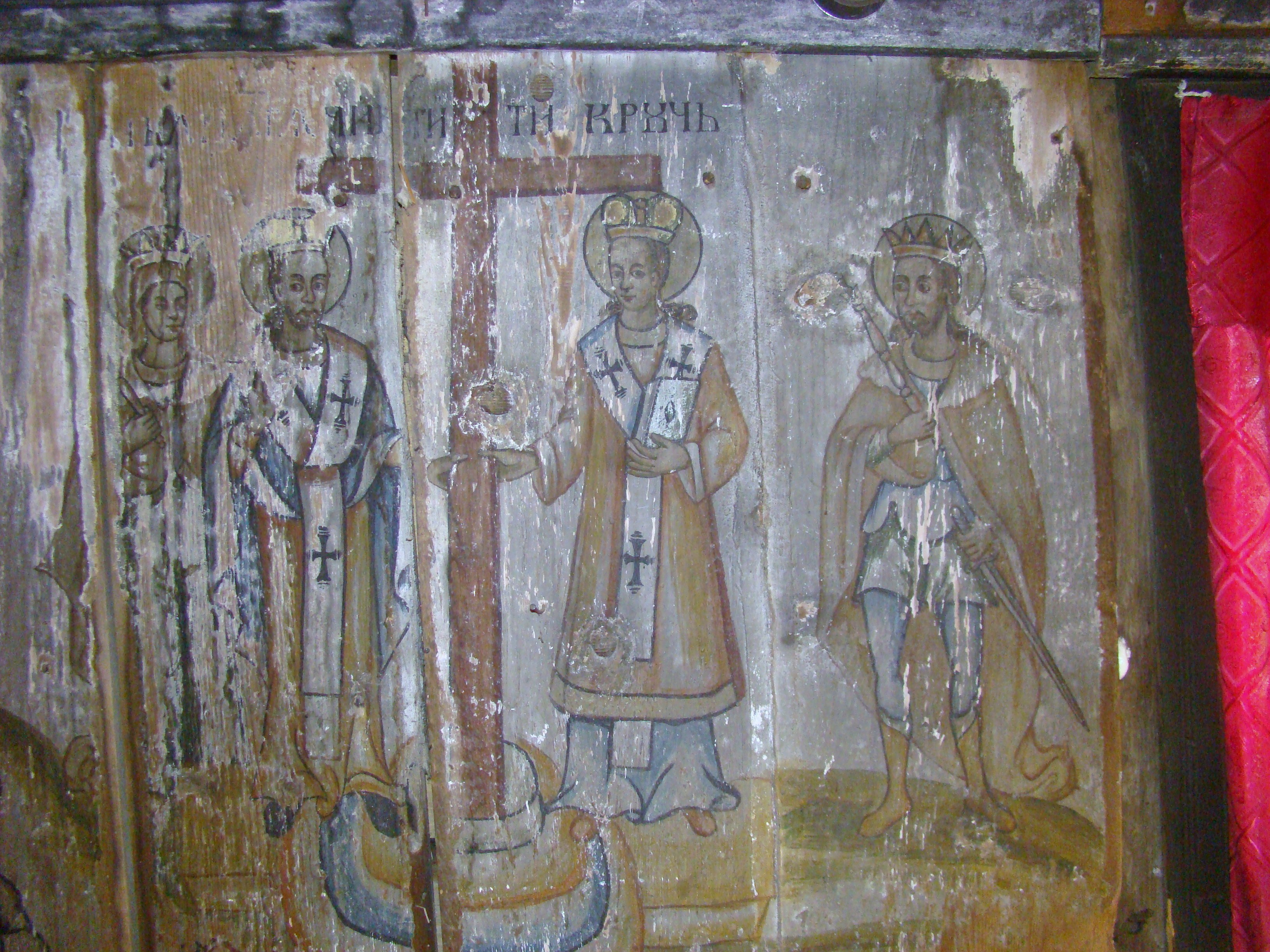 Biserica de lemn "Sfântul Dumitru" , sat DUBEŞTI; comuna OHABA LUNGĂ